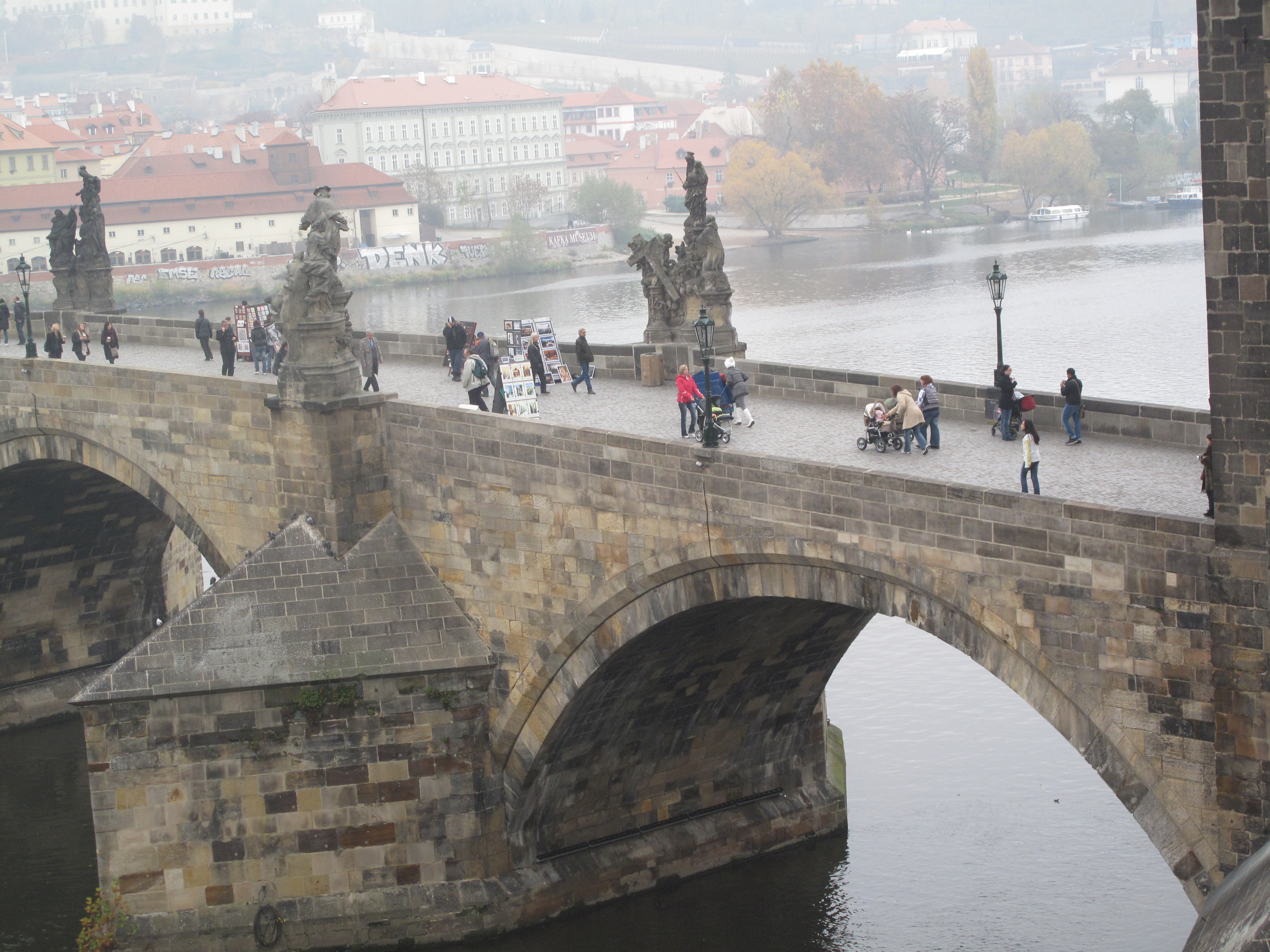 Karlův most